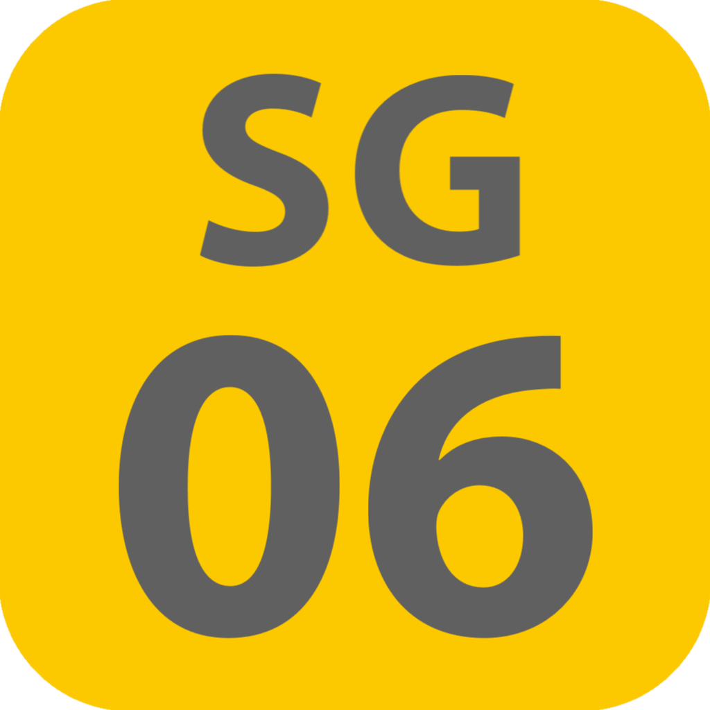 世田谷線の上町の駅ナンバリング記号